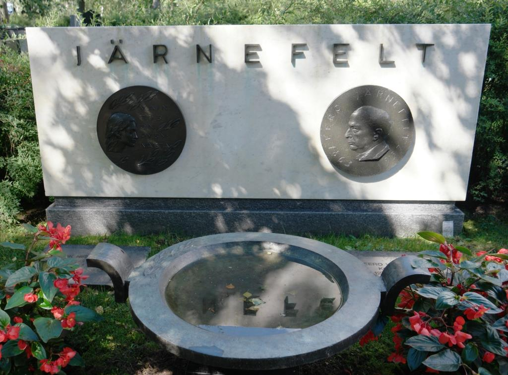 Grab des Malers Eero Järnefelt (1863-1937) auf dem Friedhof Hietaniemi in Helsinki